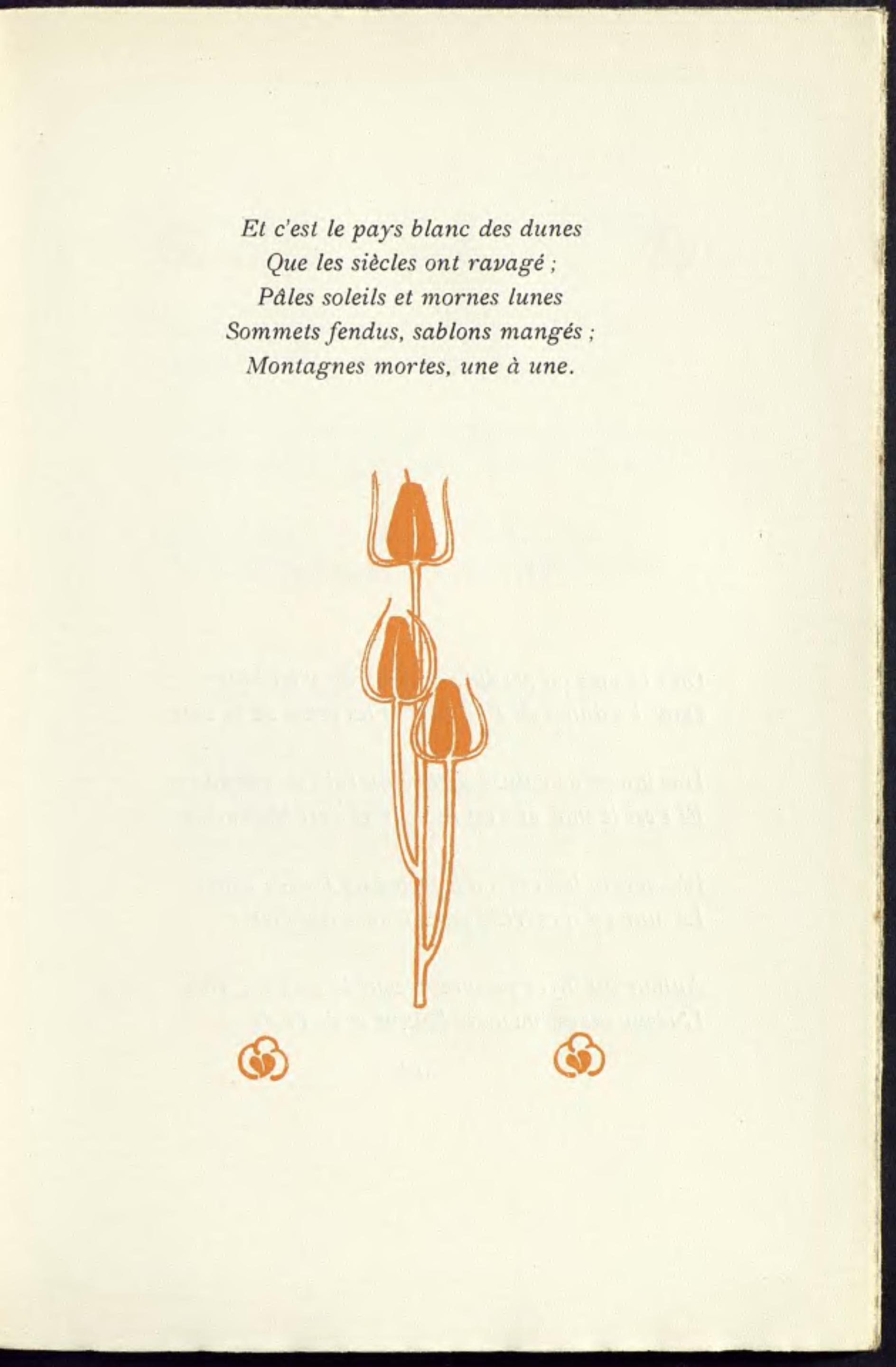 Verhaeren - La Guirlande des dunes, 1907.